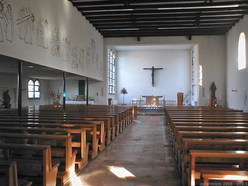 Herz-Jesu-Kirche in Bad Rappenau, Innenansicht